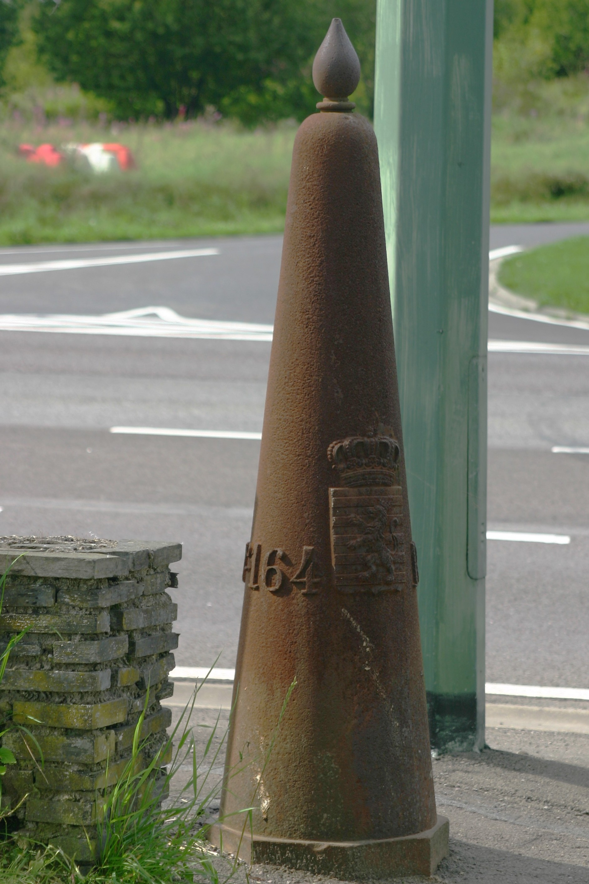 Gossemaark LB 164 zu Maartel